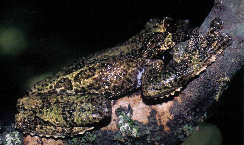 Ecnomiohyla miliaria